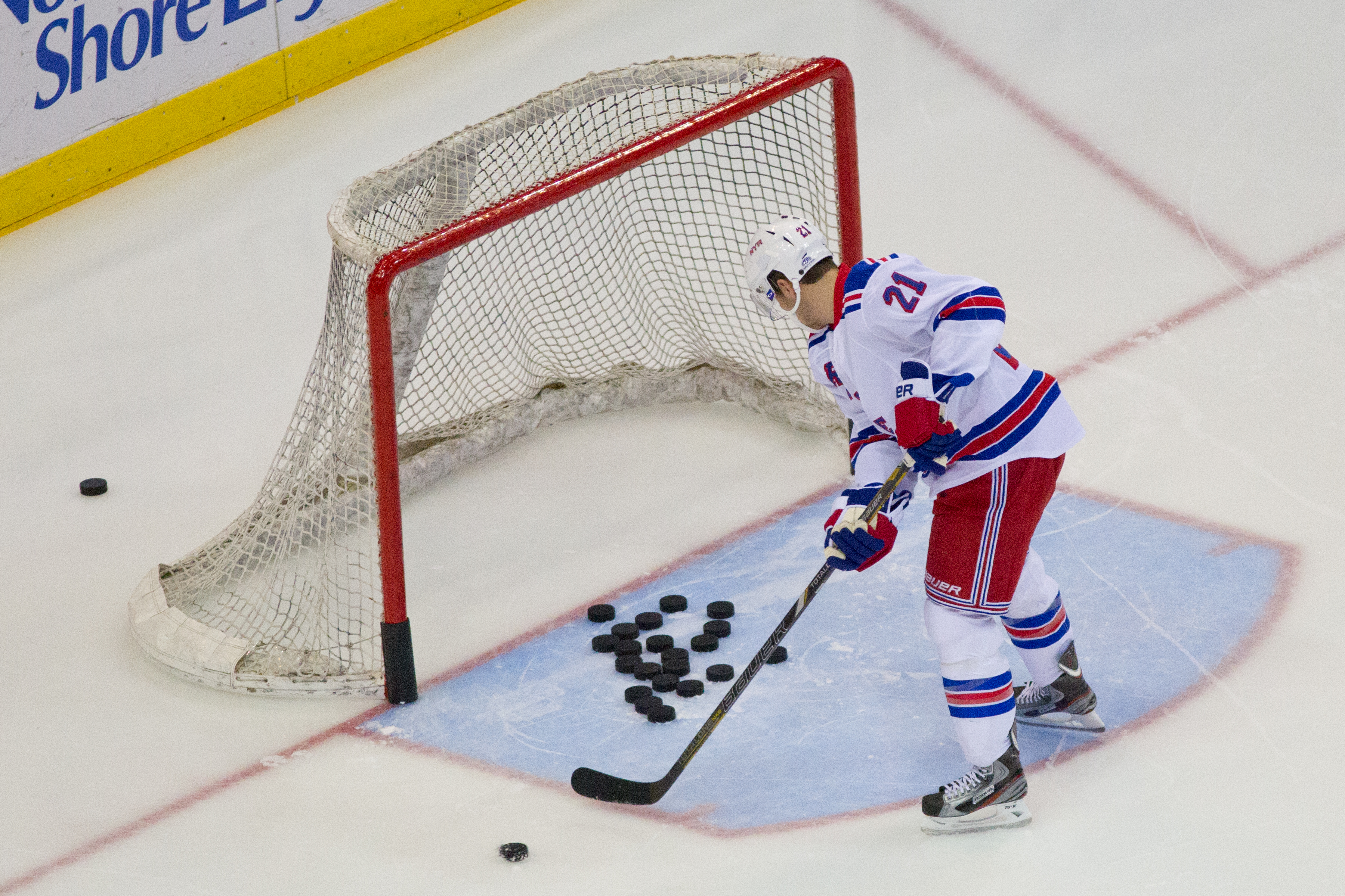 Derek Stepan